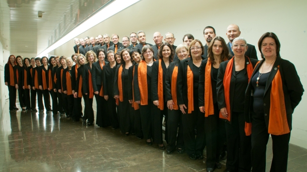 L'orfeó Atlàntida a l'Auditori de Barcelona, Novembre 2011